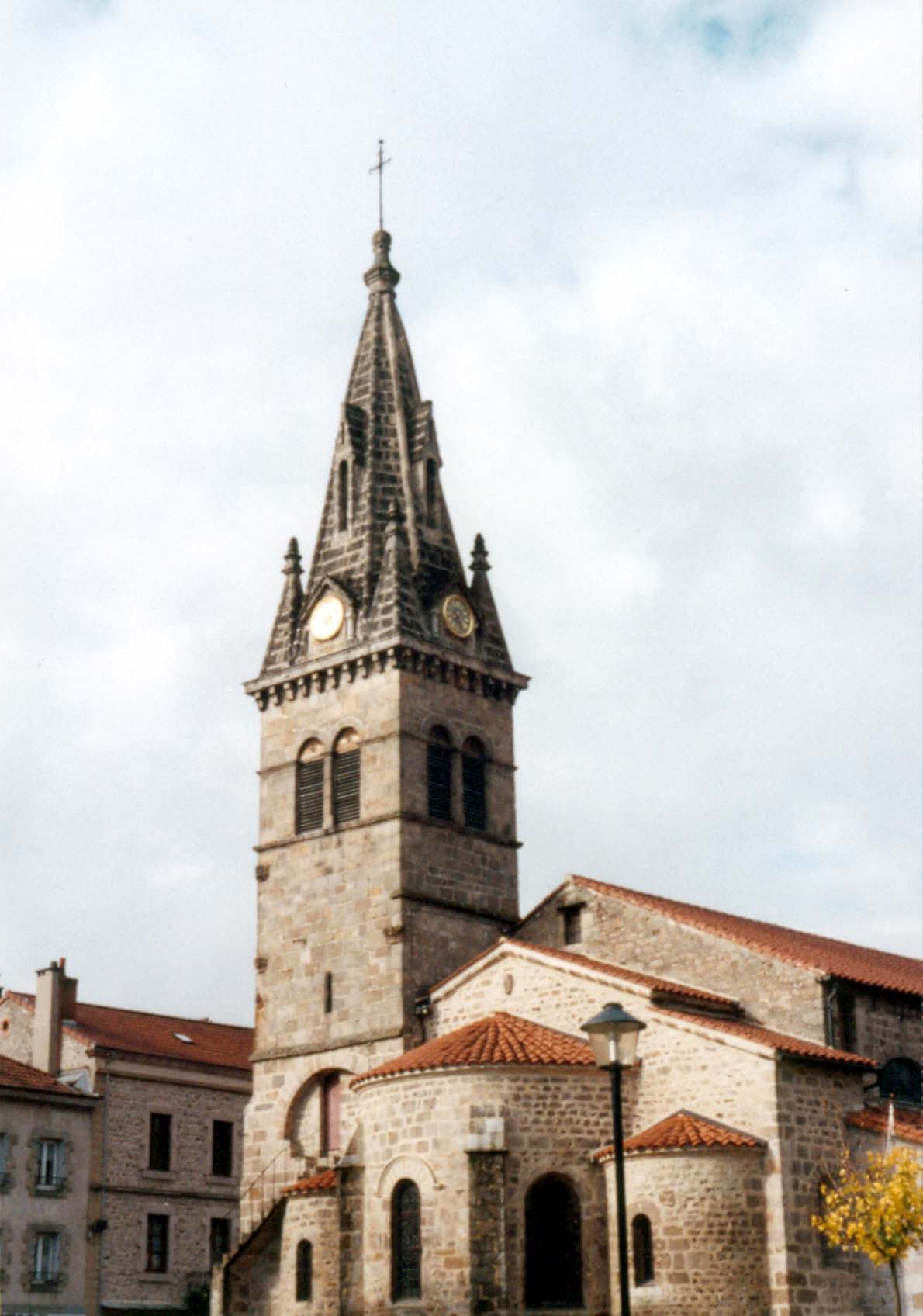 Vue de l'abside et du clocher de l'église Saint-Martin de Dunières. Auteur : Jean-Pierre Riocreux © Jean-Pierre Riocreux 2001